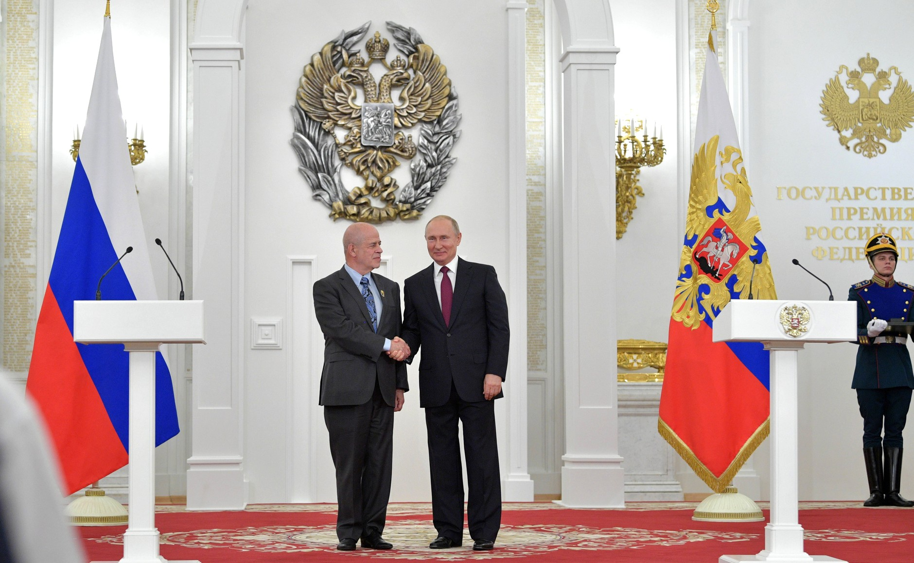 Вручение государственных премий Российской Федерации. С доктором исторических наук, академиком РАН, научным руководителем Института востоковедения РАН Виталием Наумкиным.